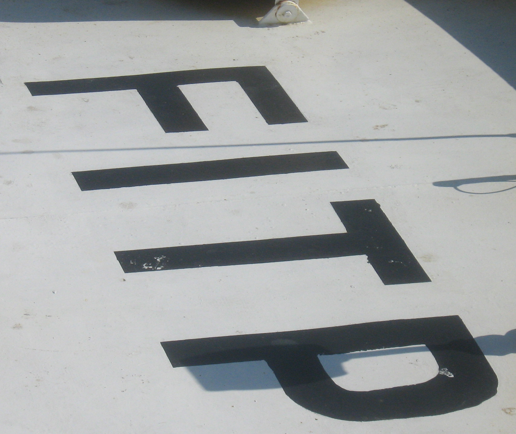 L'indicatif radio est attribué à la coque du navire. Formes des indicatifs Pays + types (navire ou aéronef en fonction du nombre de caractères). ici du navire Français équipé toutes bandes marines. Navires de pêche. L'indicatif radio doit être peint sur le toit de la timonerie, quand elle existe, de telle manière qu'il puisse être visible par un avion suivant une route parallèle à celle du navire et de même sens. La couleur des lettres et des chiffres doit être noire sur fond blanc, ou blanche sur fond noir. Pour les navires d'une longueur inférieure ou égale à 10 mètres, la taille des lettres et des chiffres est fonction de la place disponible sur le toit de la timonerie ; Pour les navires d'une longueur supérieure à 10 mètres mais inférieure ou égale à 17 mètres, les lettres et les chiffres doivent avoir au moins 25 cm de hauteur et 4 cm de largeur de trait. Pour les navires d'une longueur supérieure à 17 mètres, les lettres et les chiffres doivent avoir au moins 45 cm de hauteur et 6 cm de largeur de trait.